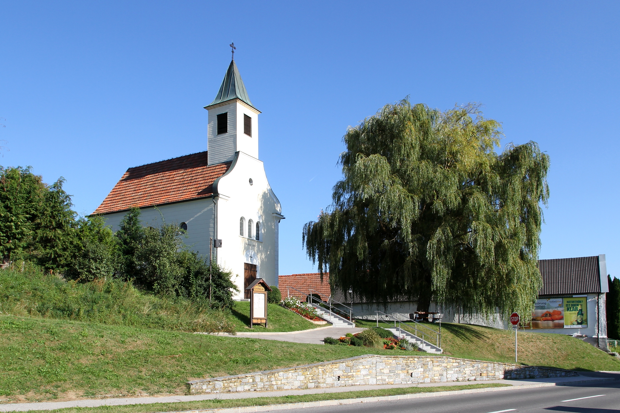 Katholische Ortskirche bzw. Filialkirche - errichtet 1953 - in Tschurndorf, ein Ortsteil der burgenländischen Gemeinde Weppersdorf.